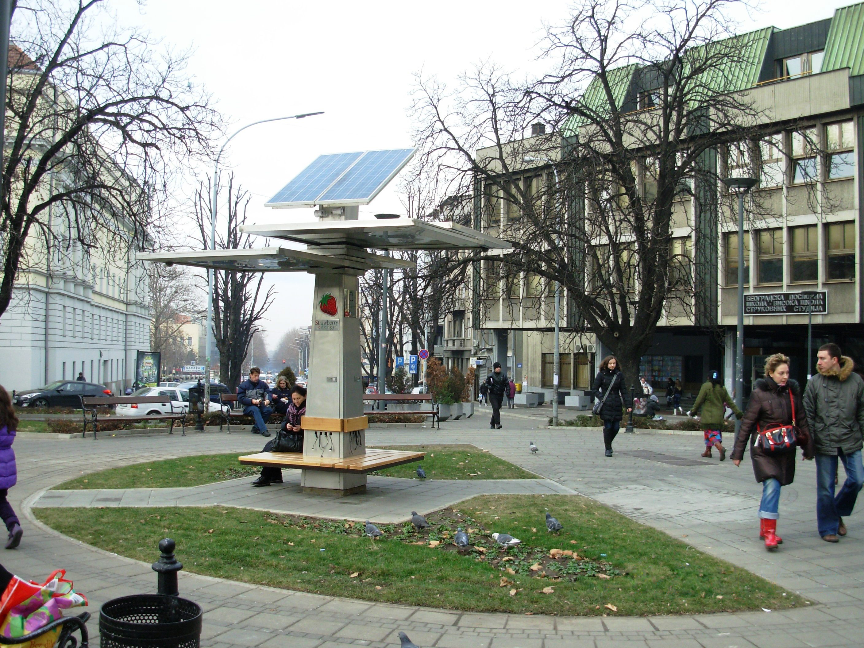 Jagoda - solarni punjač mobilnih telefona u Beogradu. Slikao Goldfinger